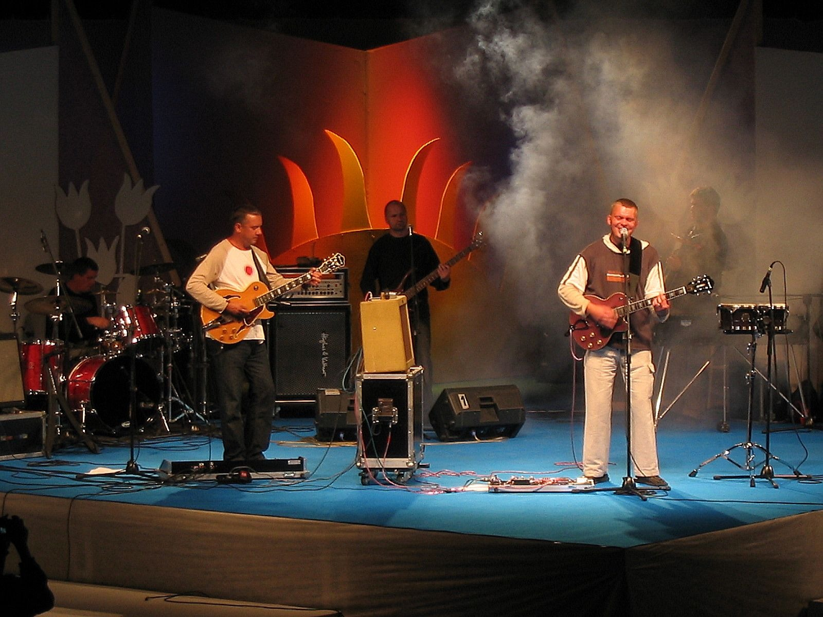 Raz, Dwa, Trzy